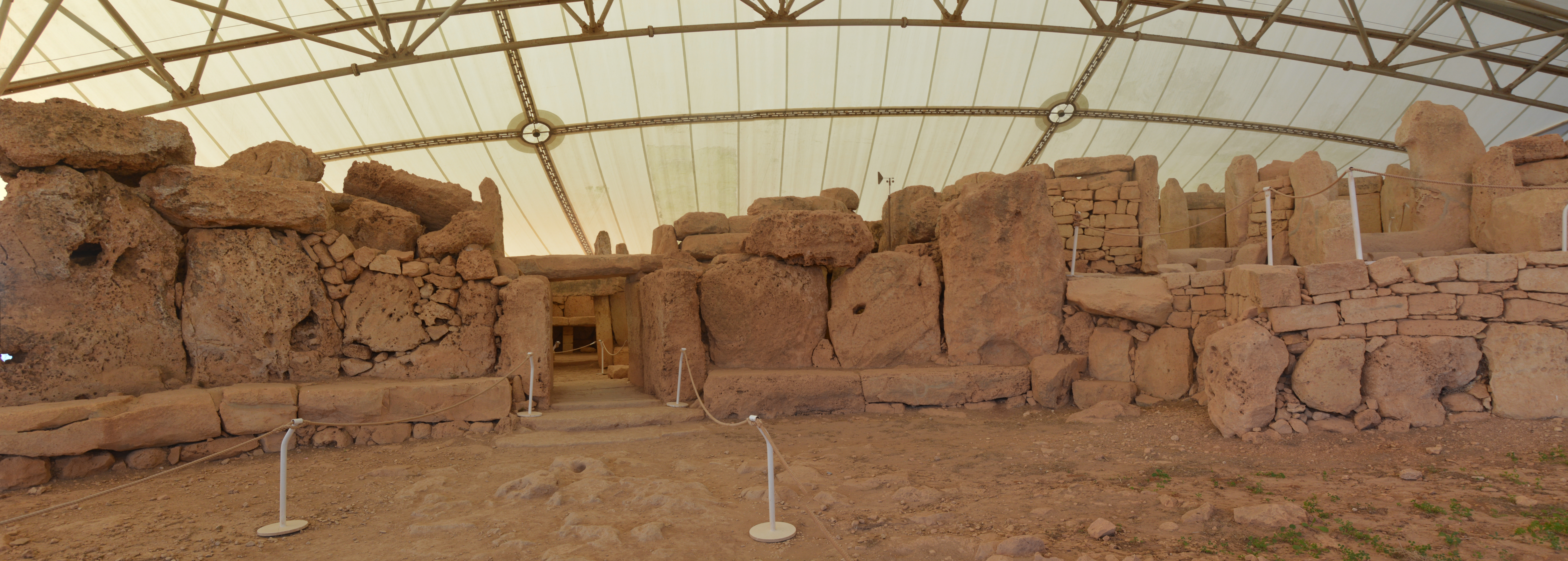 vu panoramique d'ensemble du temple bas de Mnajdra, Malte